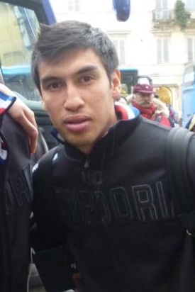 Marcelo Estigarribia prima dell'incontro di Serie A, Siena-Sampdoria del 20 gennaio 2013.